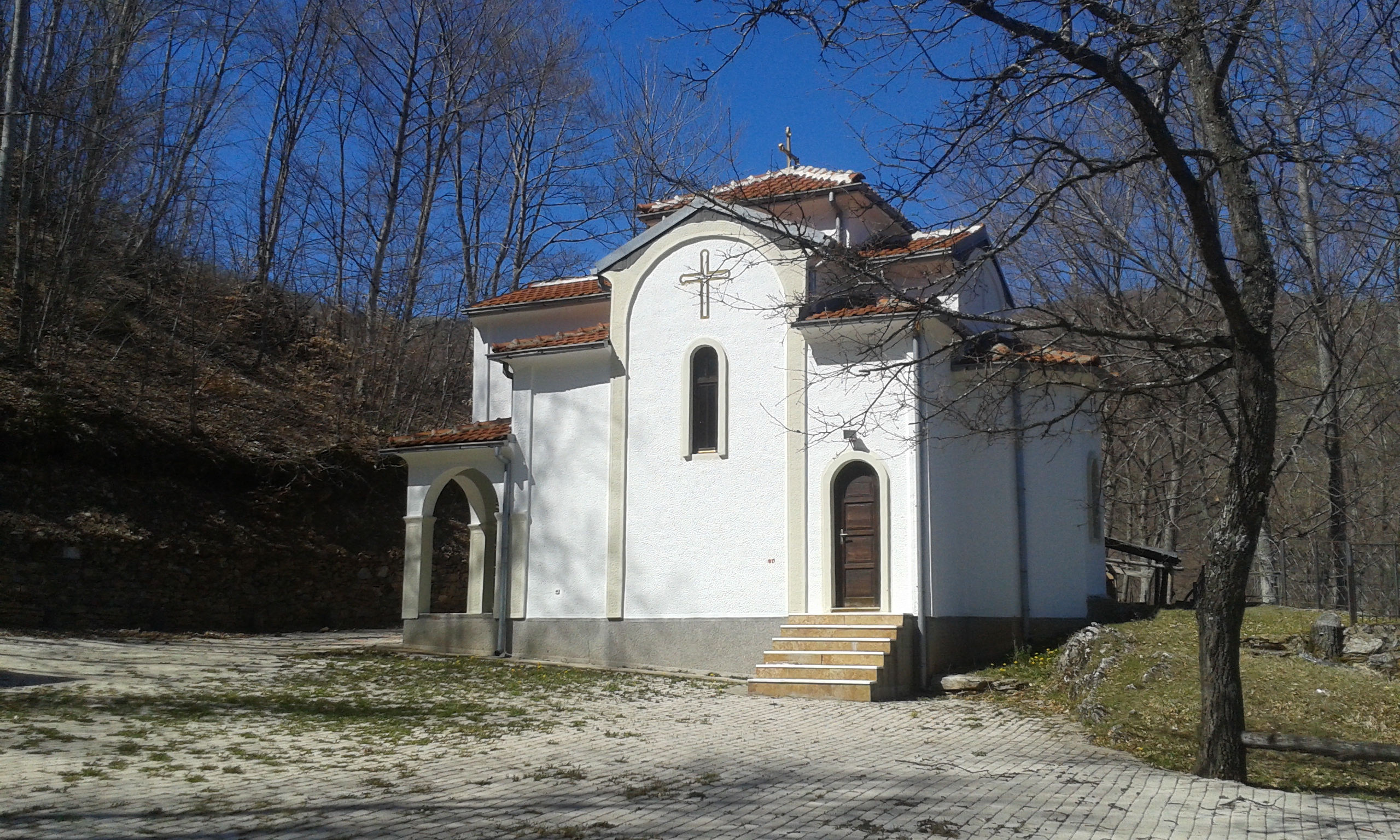 Фотографии од Луковица